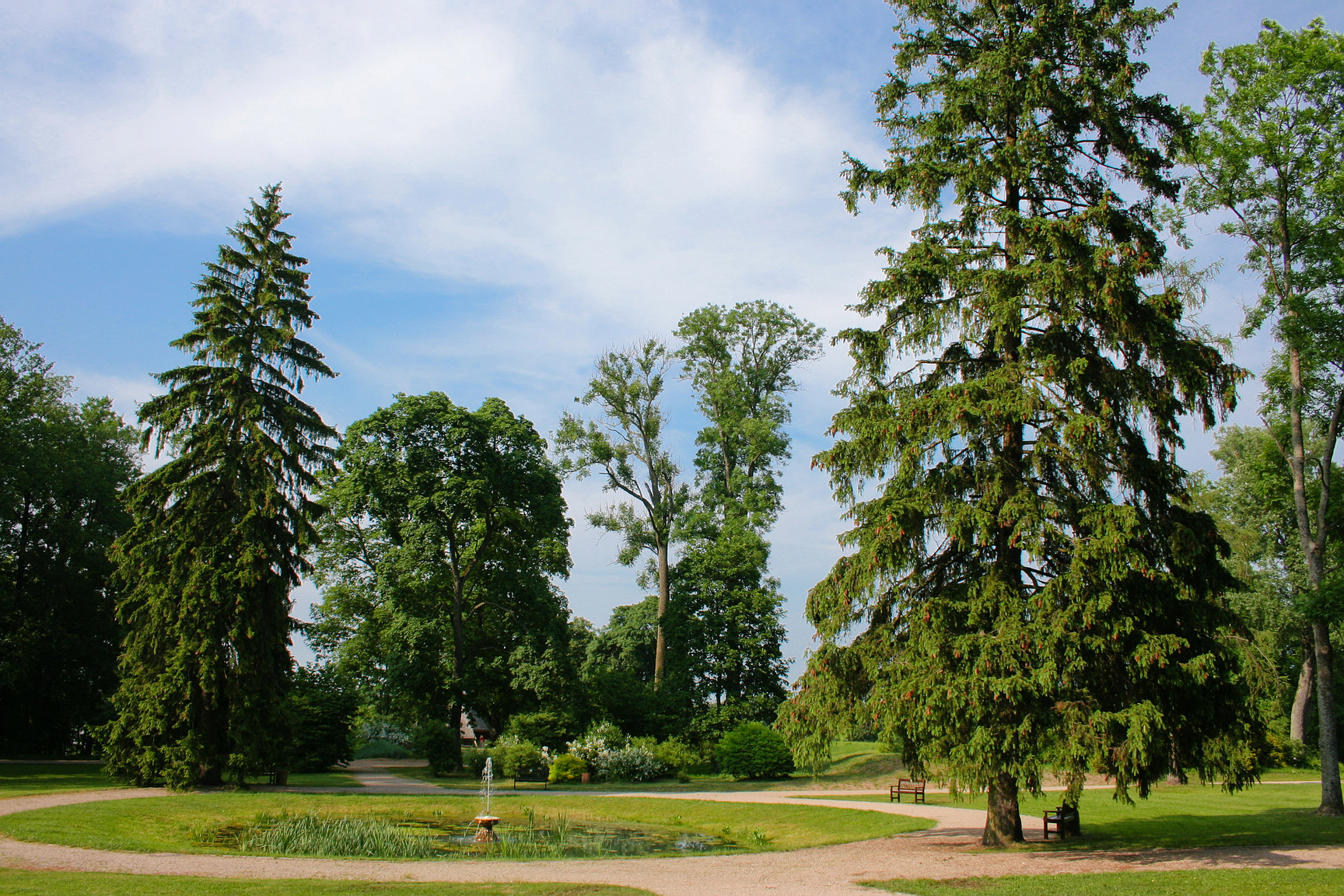 Kairėnai, VU botanical park, Lithuania